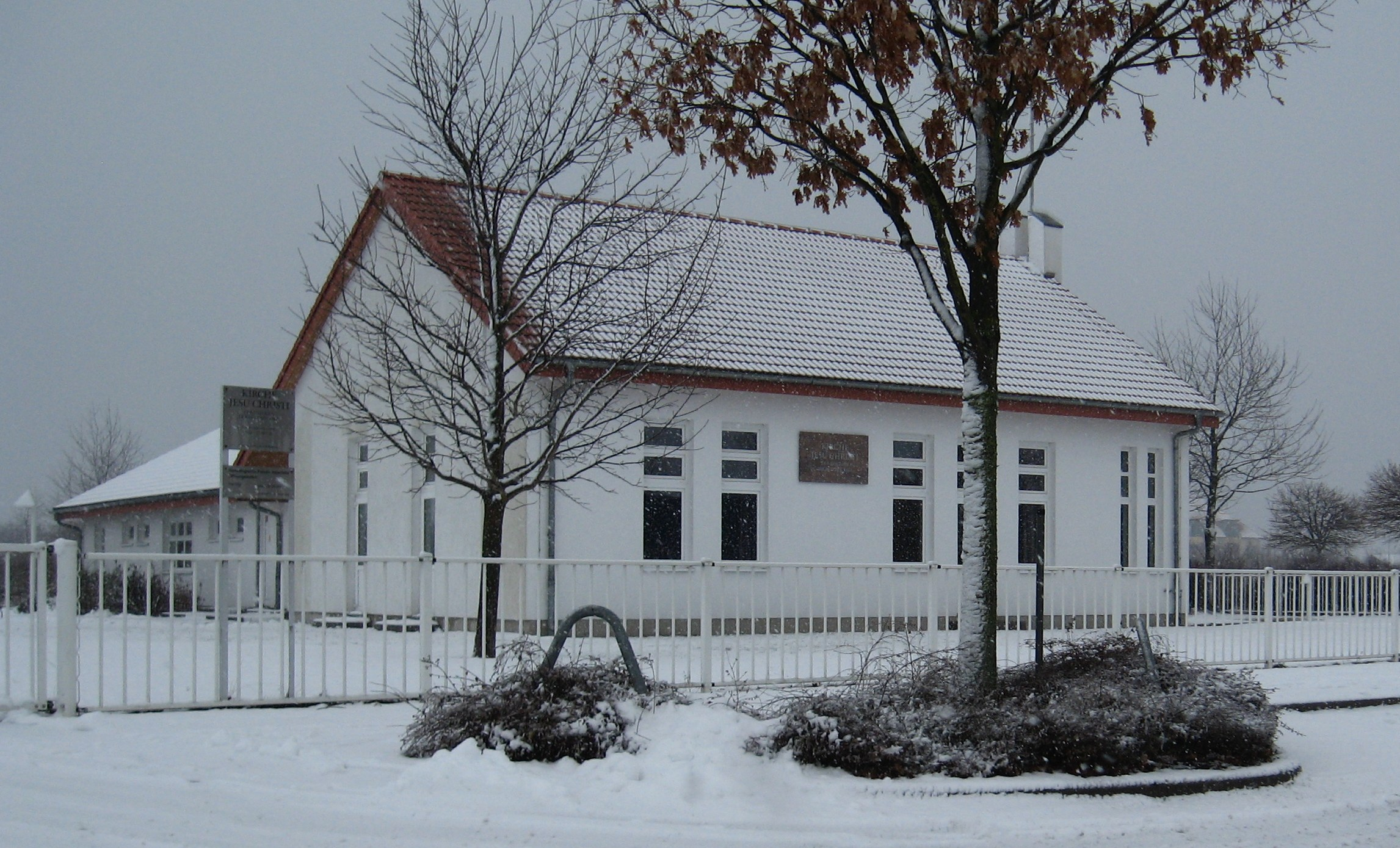 Gebäude der Kirche Jesu Christi der Heiligen der Letzten Tage in Köthen - OpenStreetMap(Info)